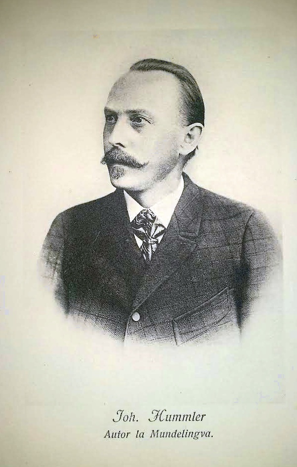 La aŭtoro de planlingvo Mundelingua